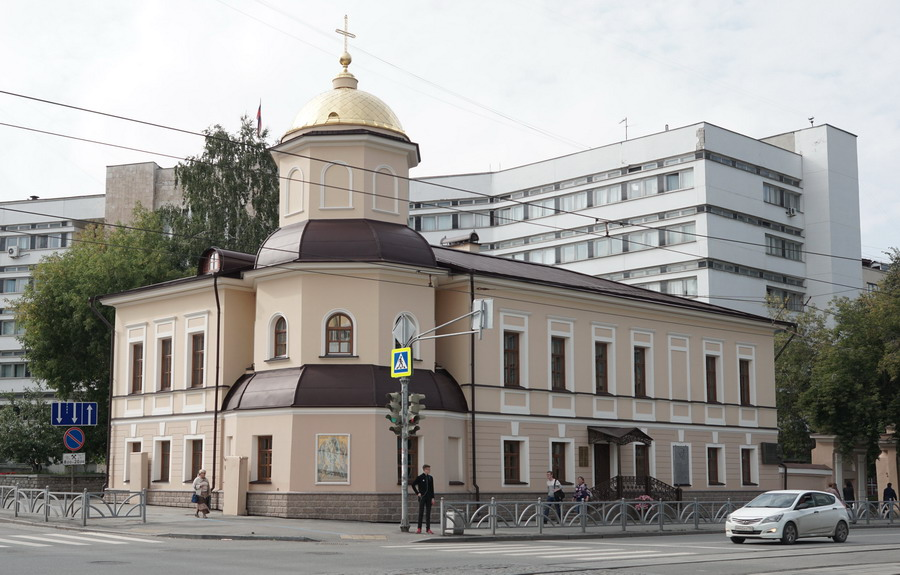 Часовня в честь Преображения Господня. Каменный двухэтажный корпус с часовней был заложен летом 1814 года, и построен в 1820 году. Центральное место в здании занимала трехъярусная Преображенская часовня. Построено здание было в стиле классицизма. В этом корпусе жили священнослужители монастыря. После 1917 года здание было изъято и превращено в жилой дом, где проживали ученый-металлург Аким Головин и поэтесса Людмила Татьяничева (в память о них на здании установлены мемориальные доски). В дальнейшем дом был расселен - в нем размещен Институт философии и права Уральского отделения Российской Академии наук. В 2010-е годы здание было возвращено Ново-Тихвинскому женскому монастырю и в нем вновь восстановлена часовня.